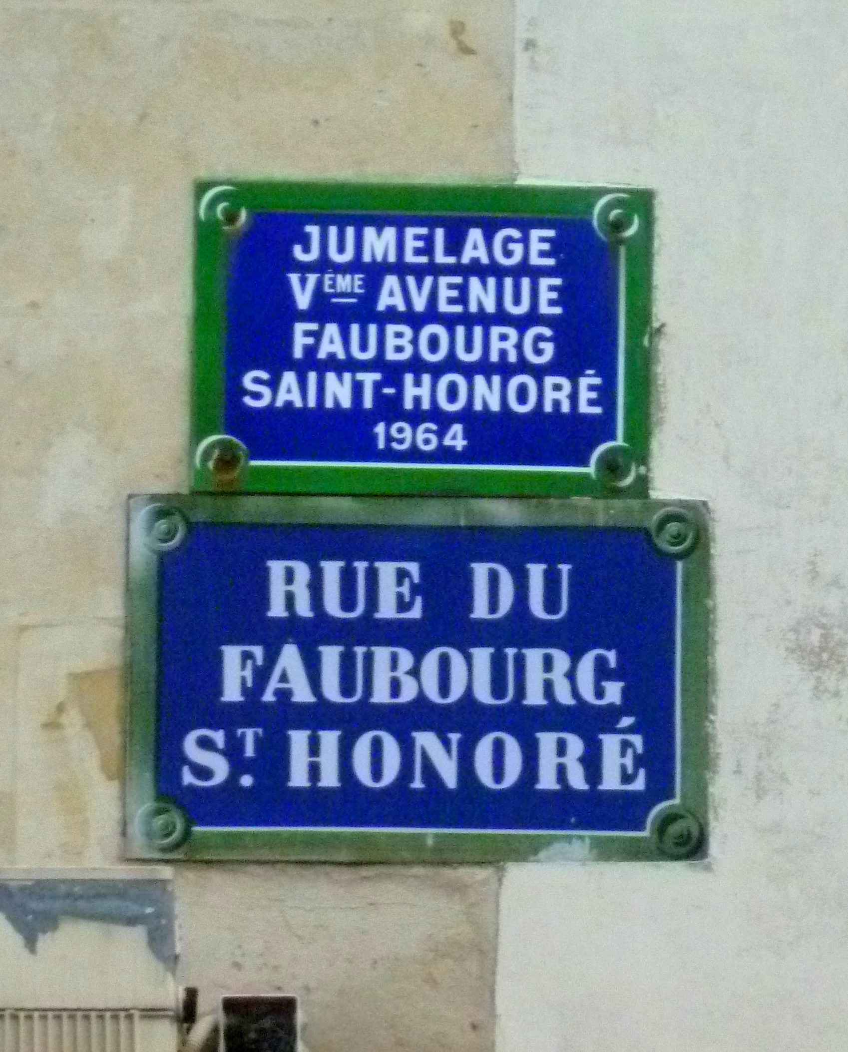 Plaque apposée rue du Faubourg Saint-Honoré (vers le N°126 -122) VIIIe arrondissement de Paris